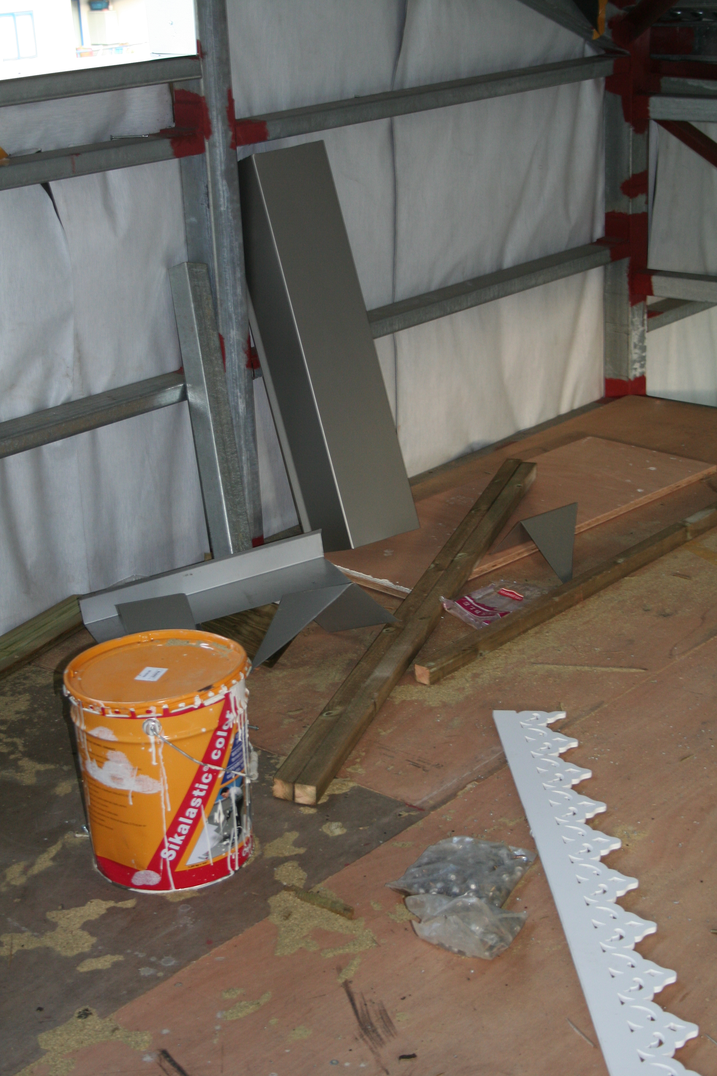 Différents objets laissés sur un chantier, à La Réunion.